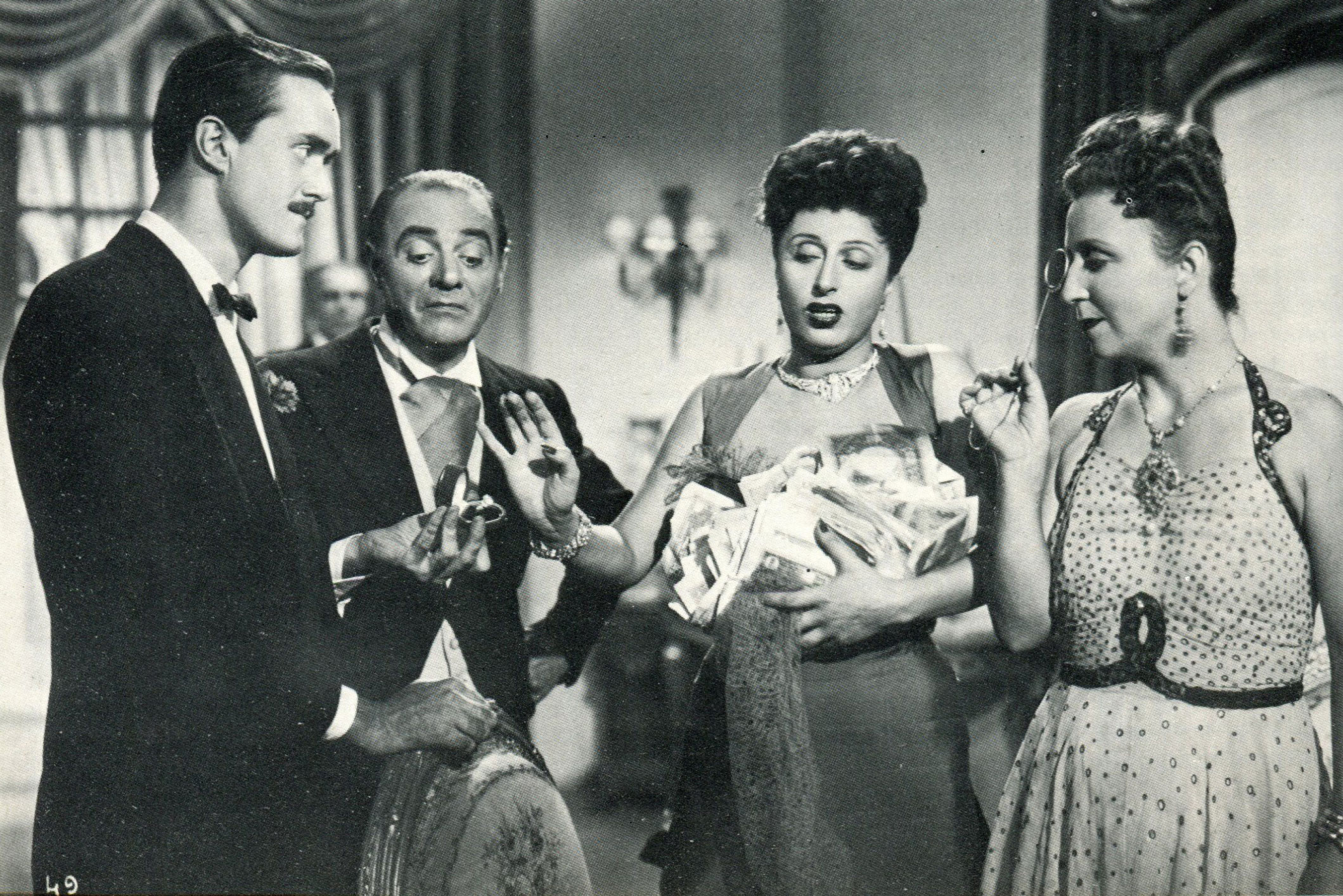 Abbasso la ricchezza! - regia di Gennaro Righelli - produzione Ora Film + Lux Film, Roma - 1947 - foto di scena con Galeazzo Benti, Virgilio Riento, Anna Magnani, Dina Romano